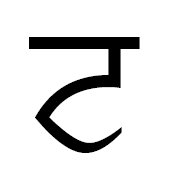 тэнка